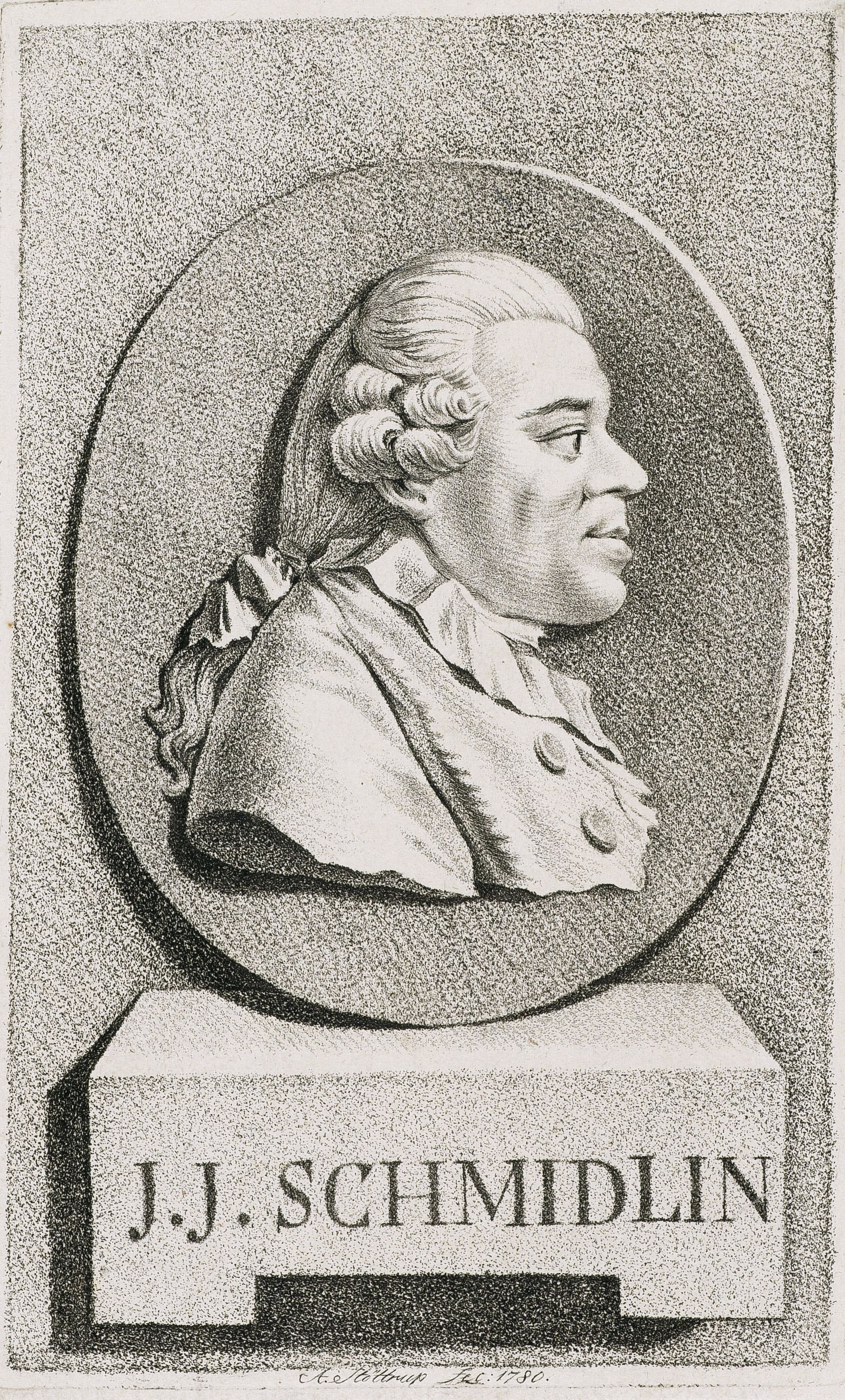 J. J. Schmidlin